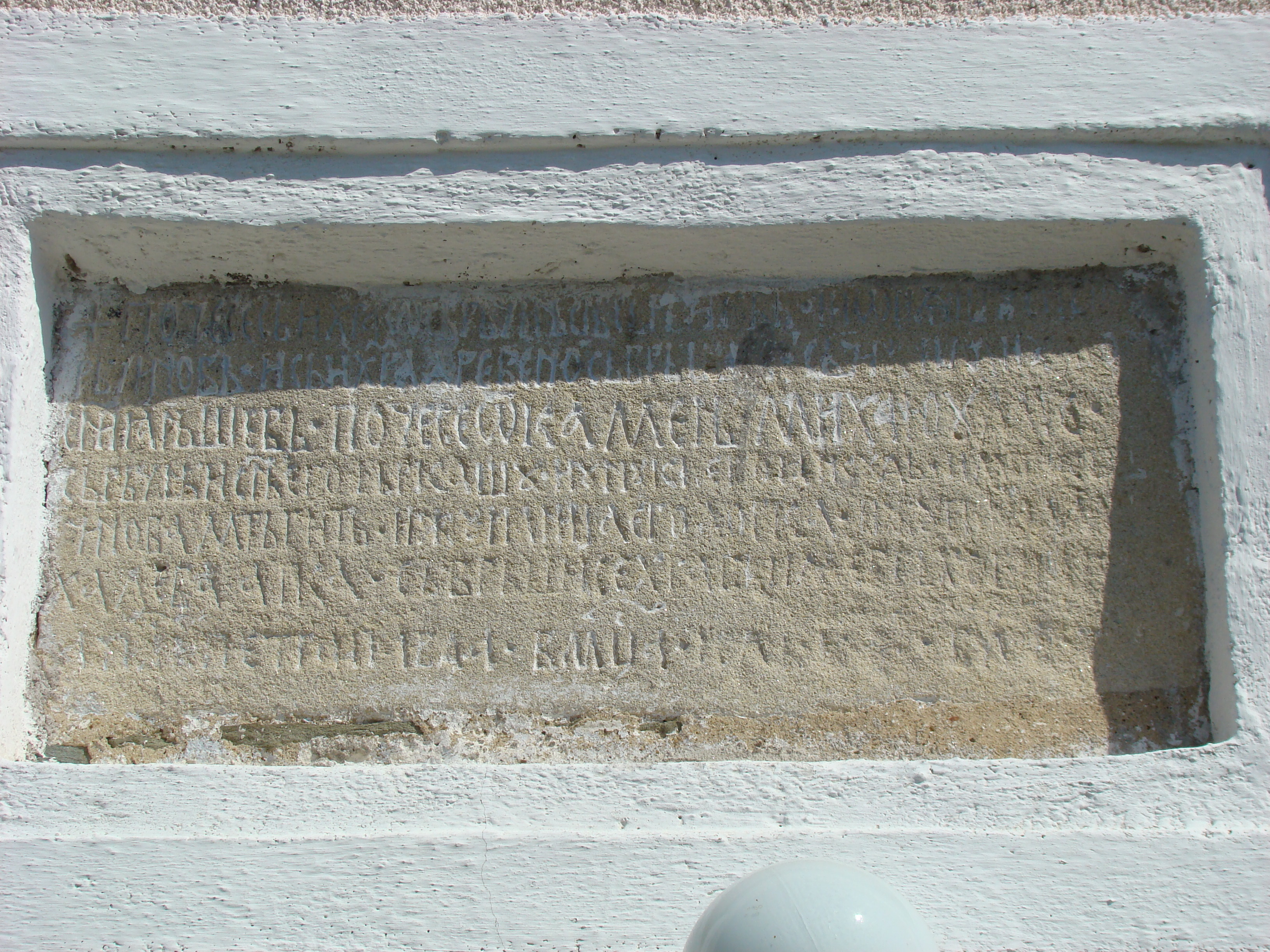 Biserica "Iobagilor”, sat SĂLAŞU DE SUS; comuna SĂLAŞU DE SUS